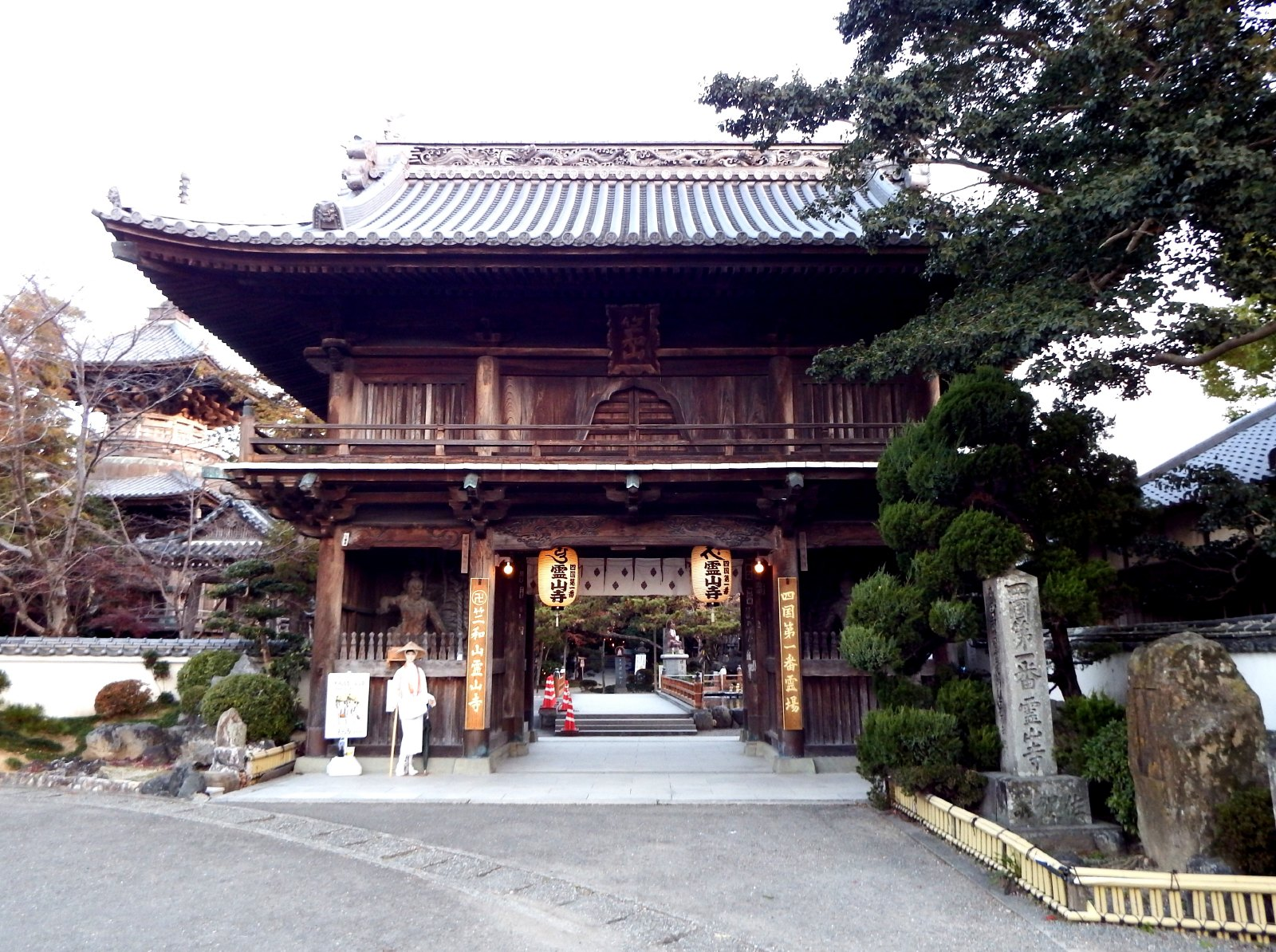 霊山寺の山門